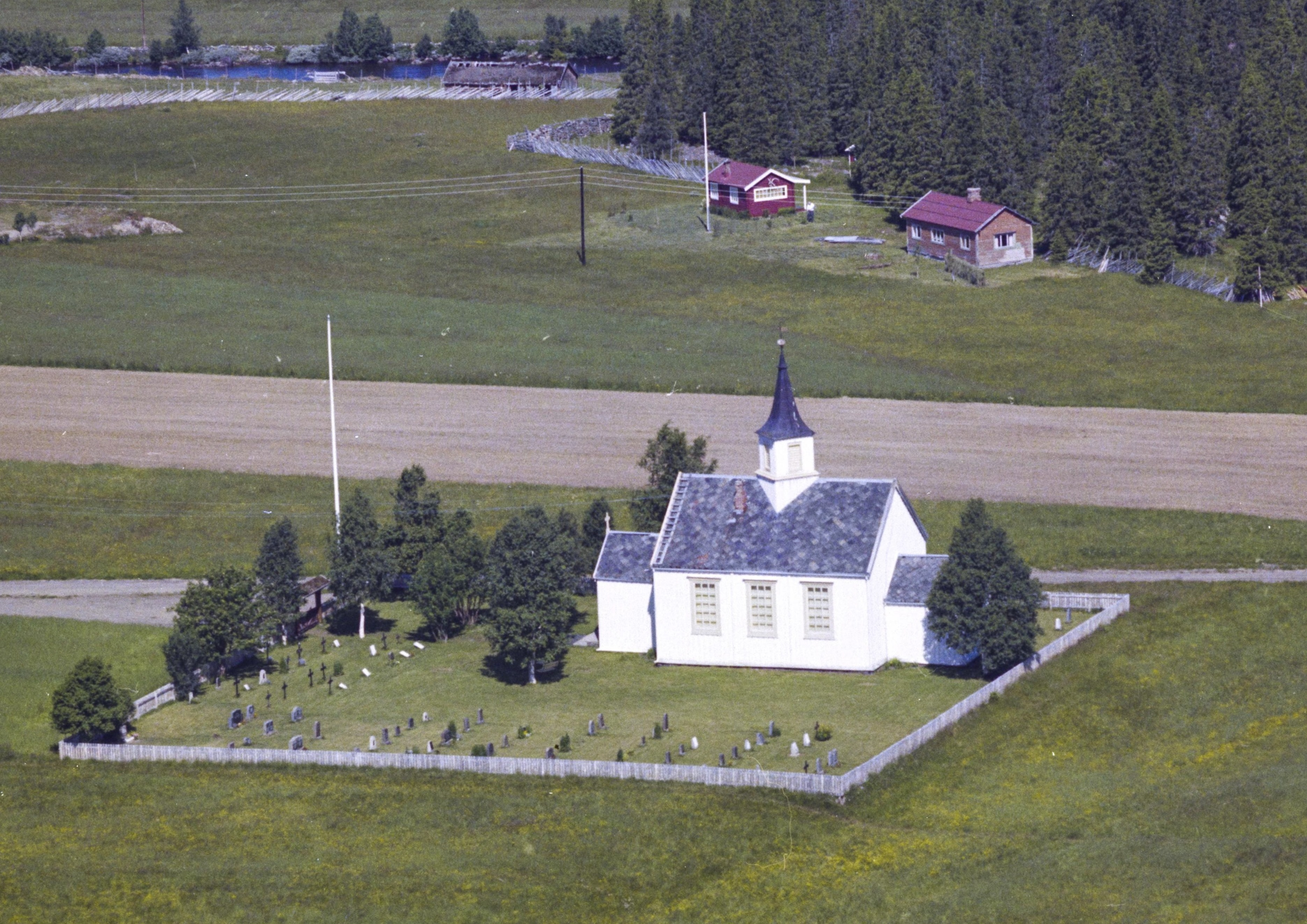 Stordalen kapell. Foto: Widerøes Flyveselskap. Fra Nasjonalbibliotekets samling.